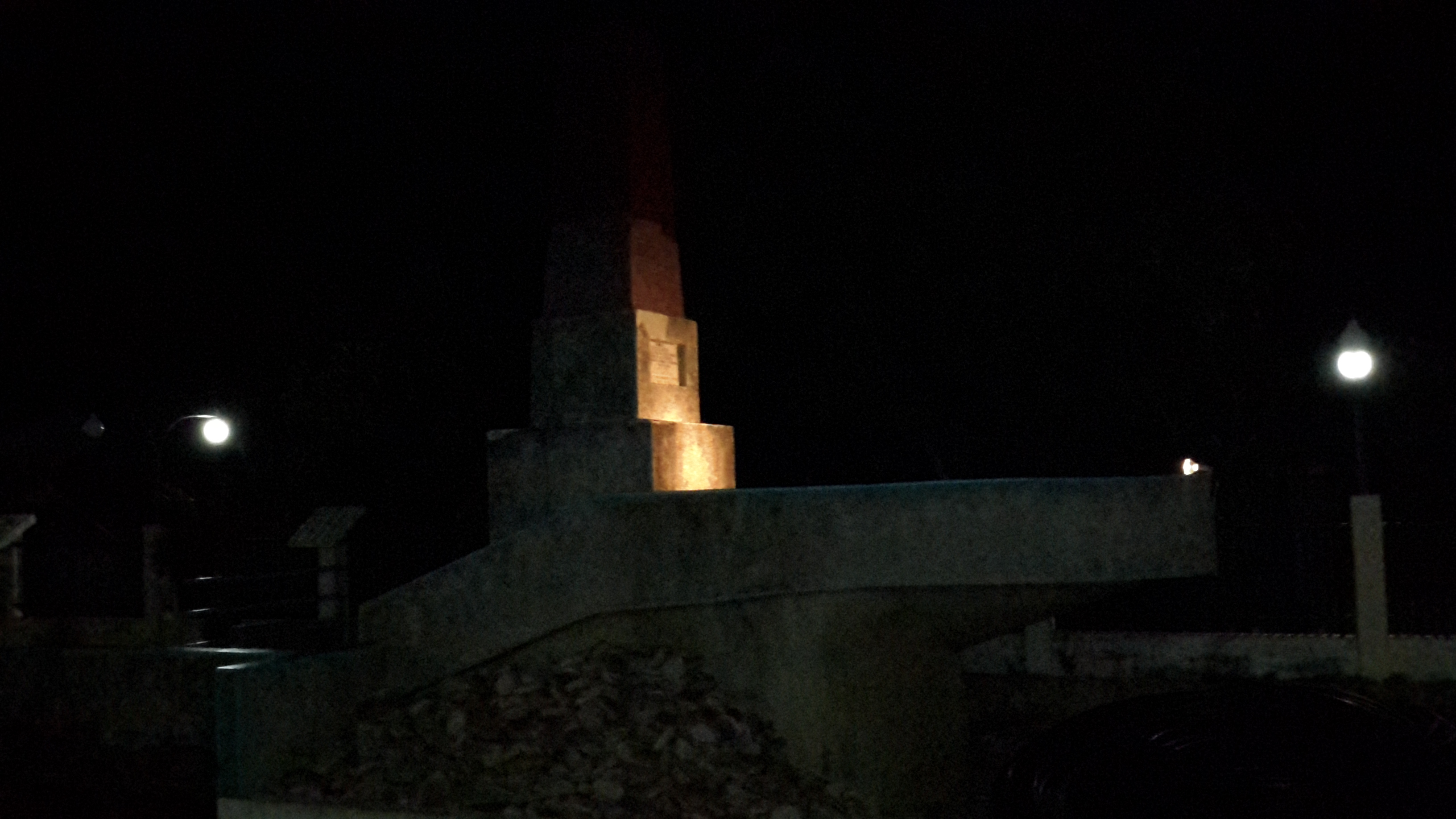 MagellanShrine